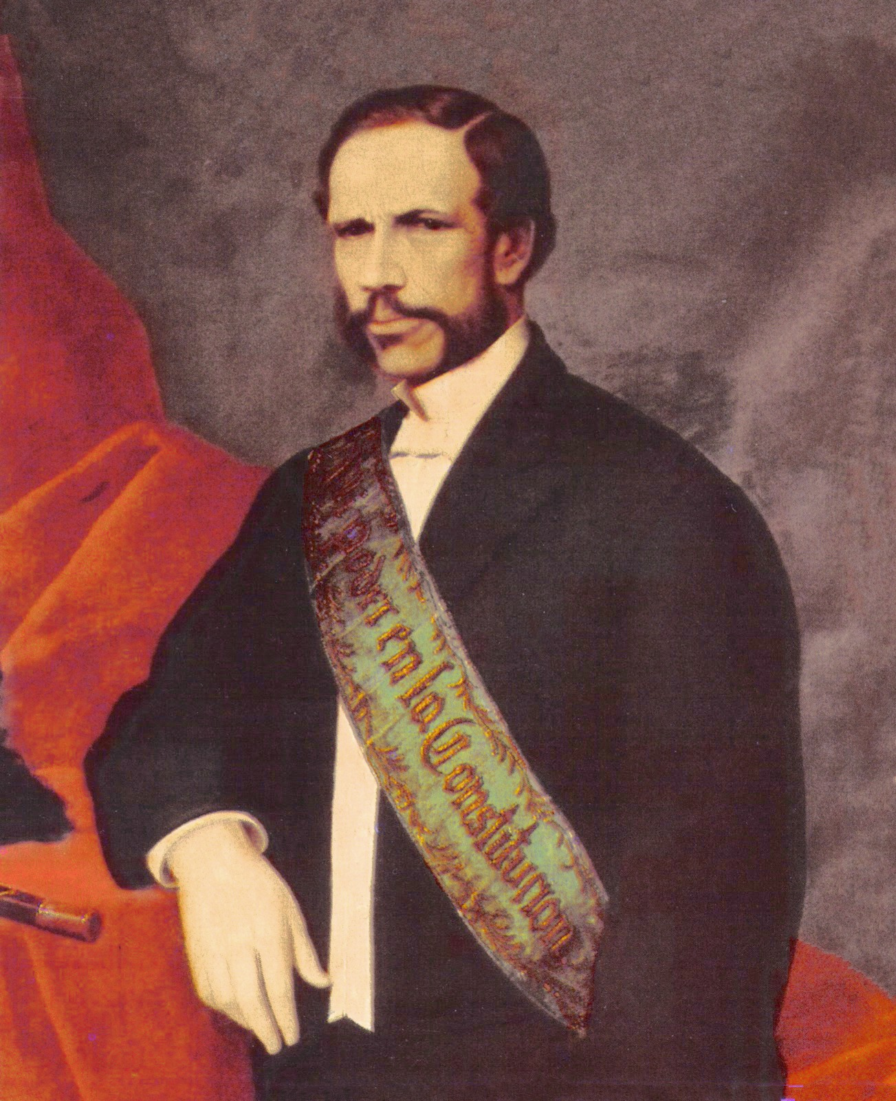 José Javier Espinosa (1815 - 1870) De auteursrechten voor deze afbeelding zijn verlopen. De auteur is meer dan 70 jaar dood.